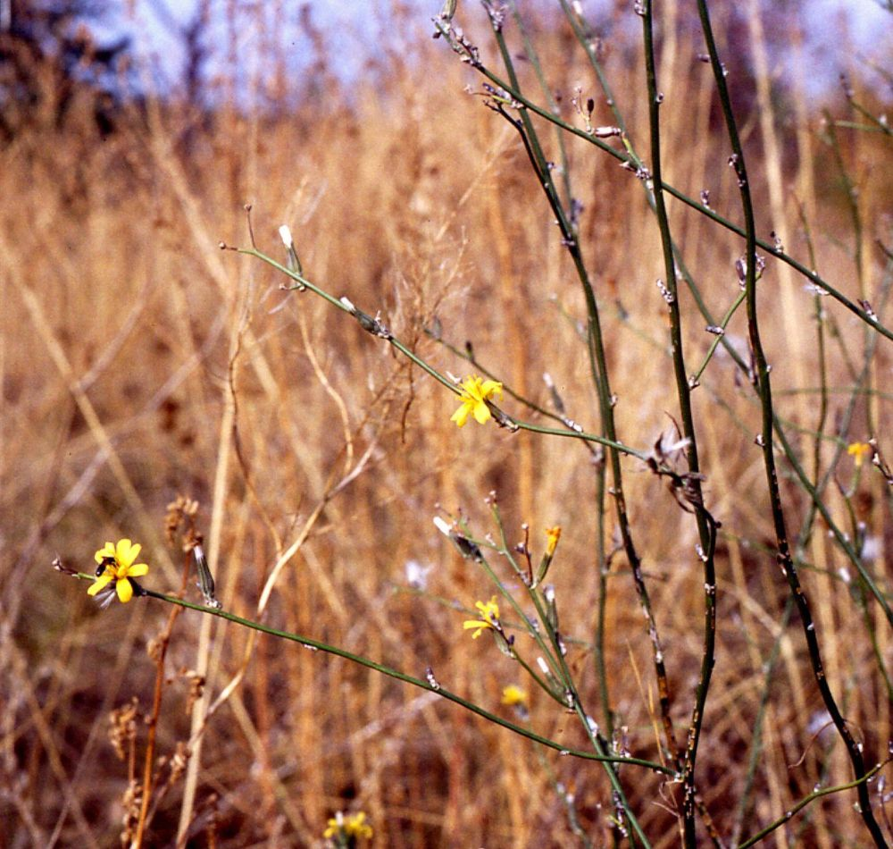 Binsen-Knorpellattich (Chondrilla juncea L.), Korbblütler (Asteraceae) - Österreich/Austria/Autriche: Niederösterreich, Weinviertel, Pulkautal, N Zellerndorf